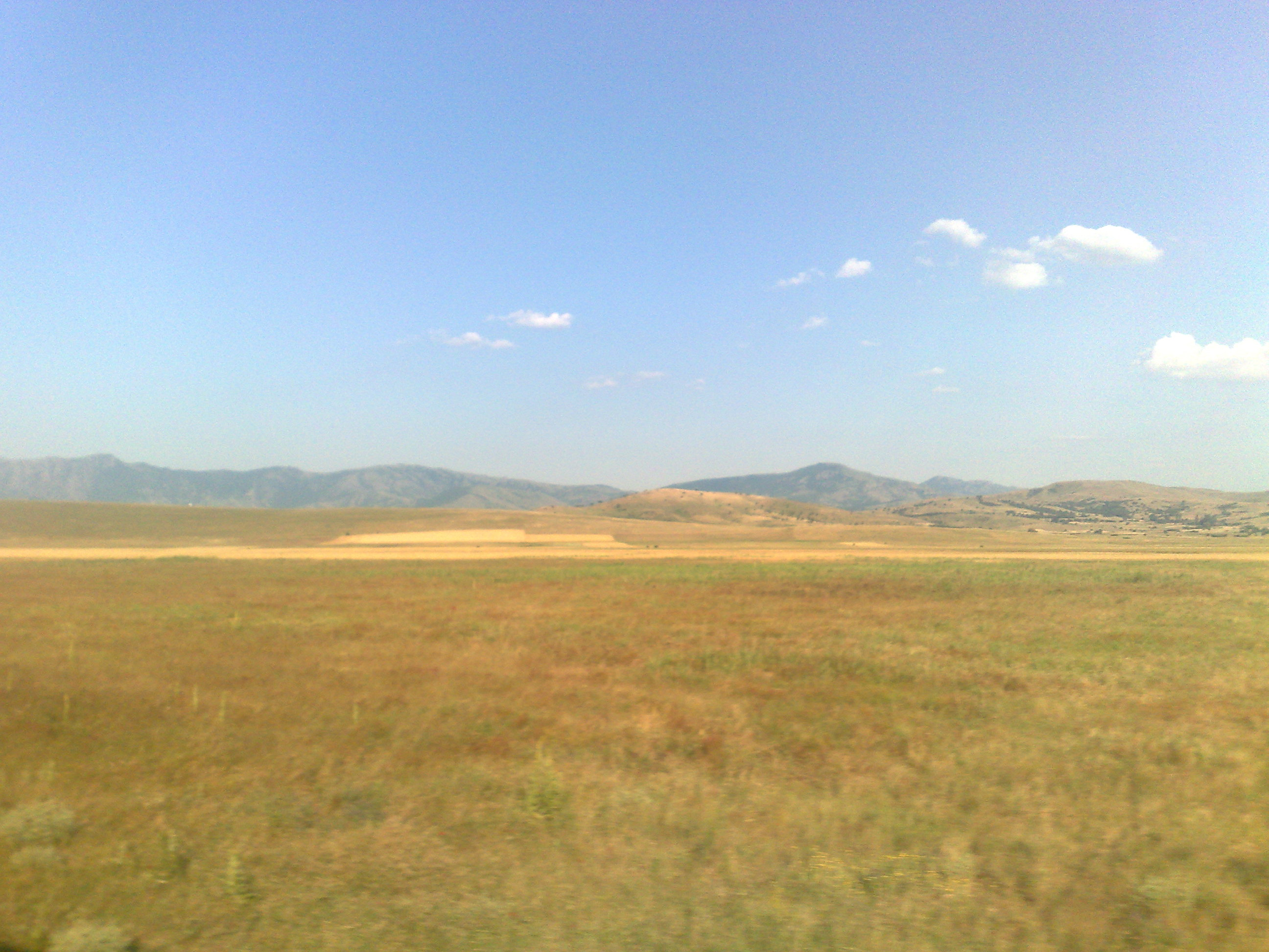 Пелагонија